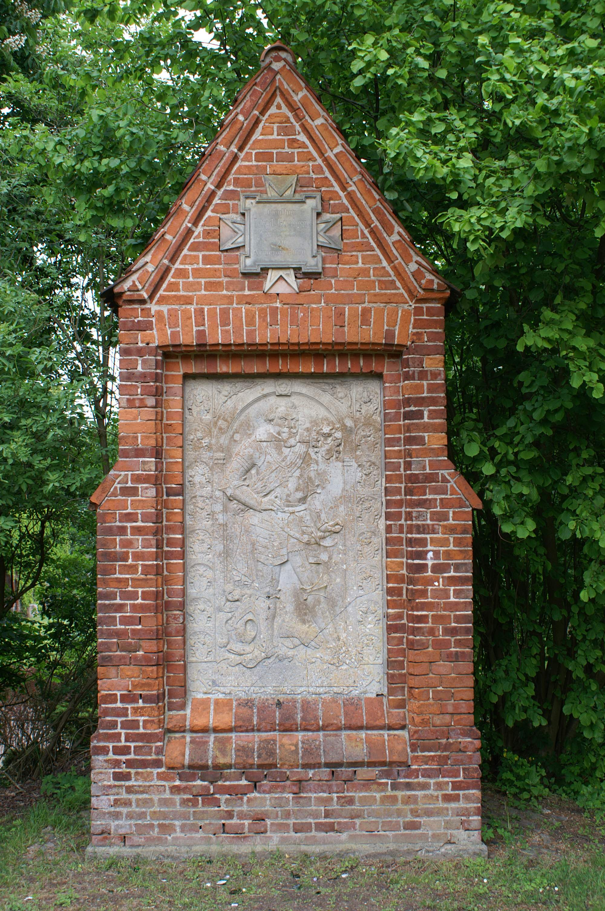 Klein Nemerow - Gedenkstein mit Relief des letzten Komturs Ludwig van der Groeben (d. 1620)